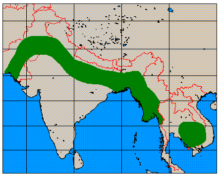 Hog deer (Axis porcinus) range map